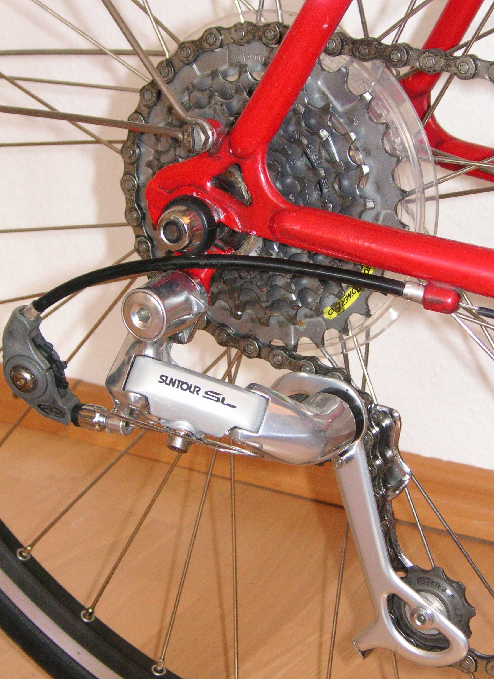 Suntour SL Schaltwerk (1993), modifiziert mit long cage Schaltschwinge